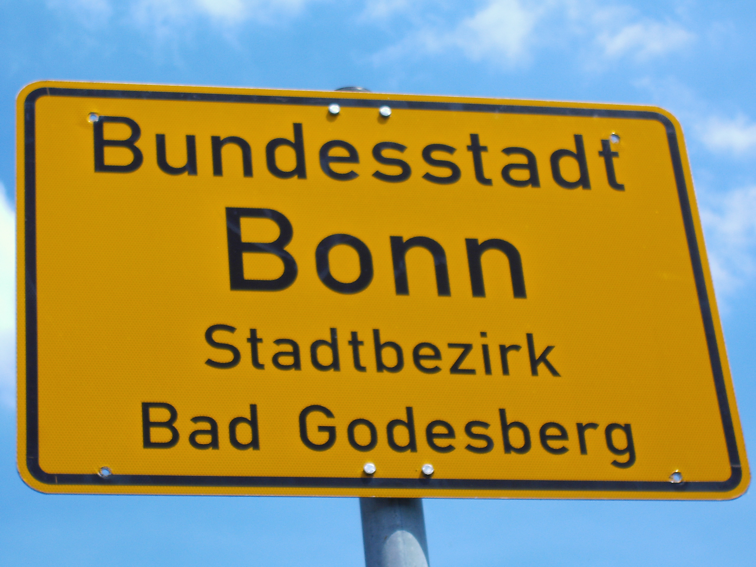 Ortseingangsschild von Bonn an der Mainzer Straße im zum Stadtbezirk Bad Godesberg gehörenden Stadtteil Mehlem. Aufschrift: Bundesstadt Bonn – Stadtbezirk Mehlem.